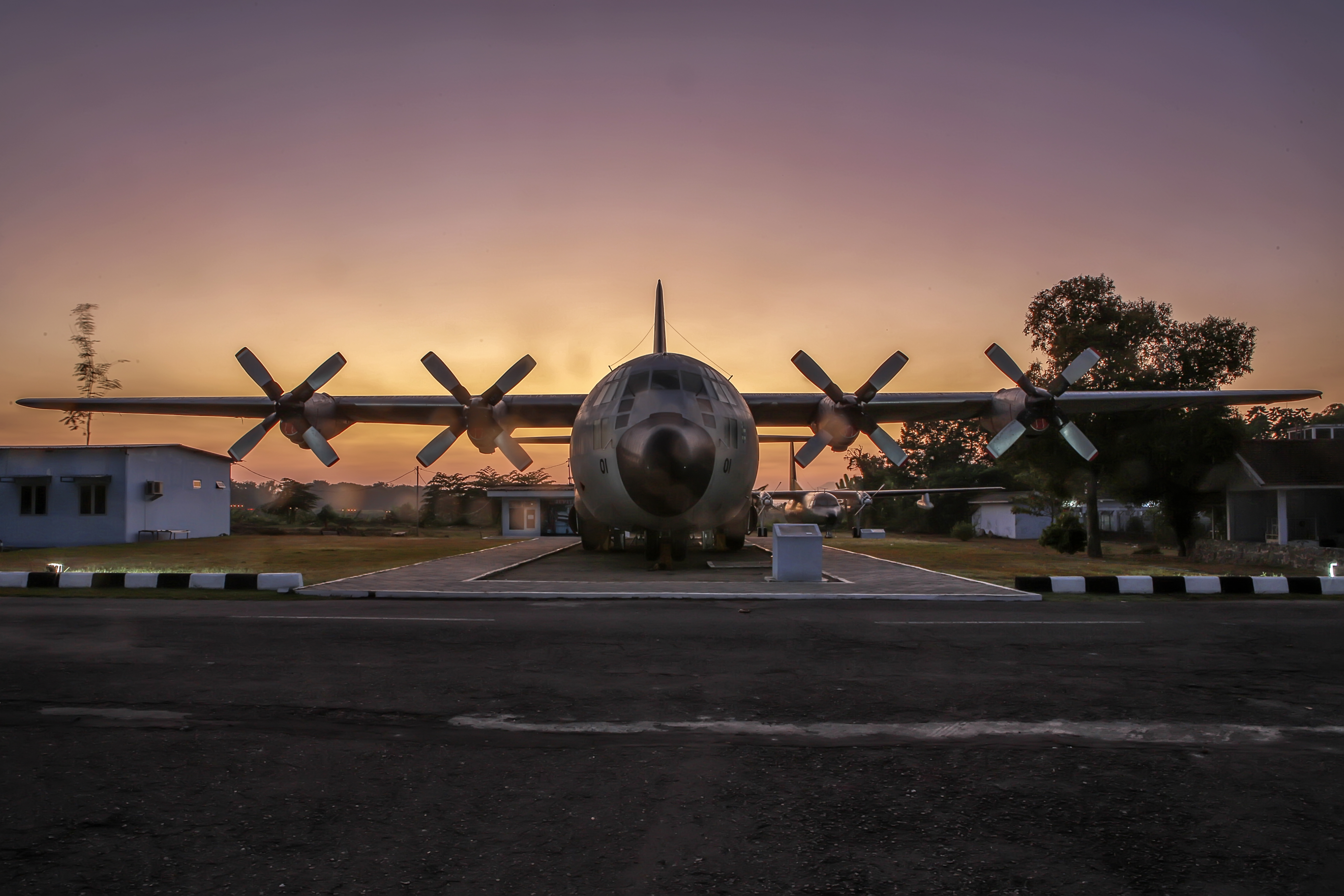 Pesawat C-130B Hercules T-301, TNI AU, sisi lainnya